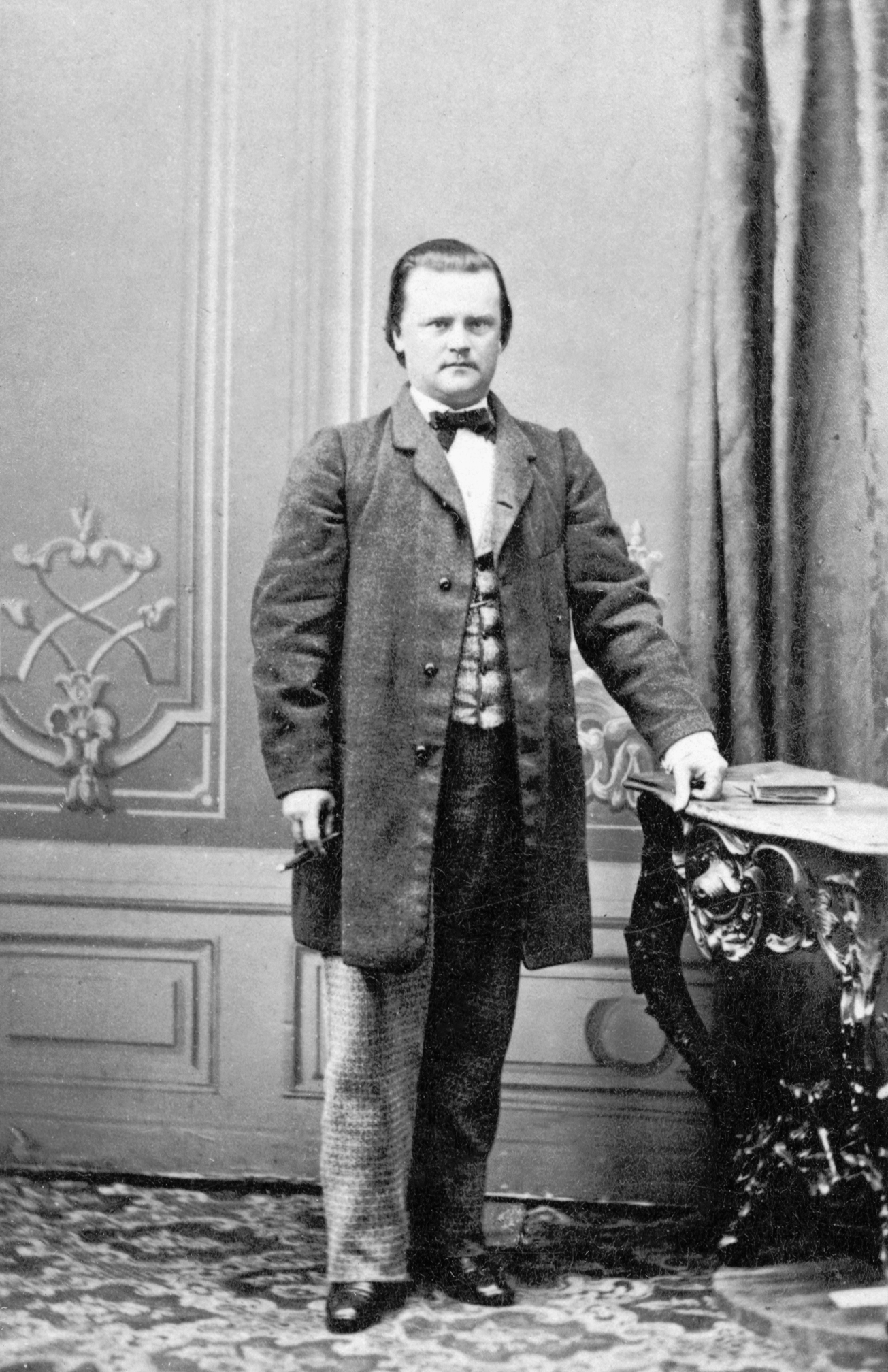 Victor Dahlgren, sångare vid Kungliga Operan 1863